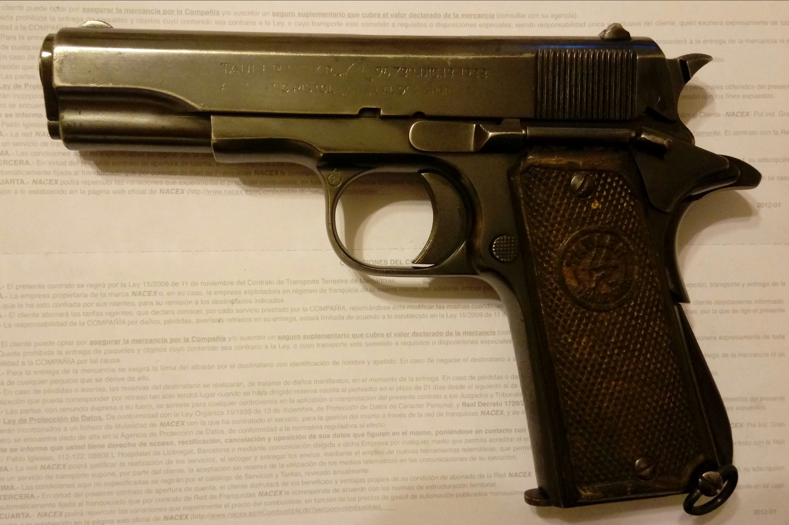 Pistola Tauler Super Police, clon de la Llama III